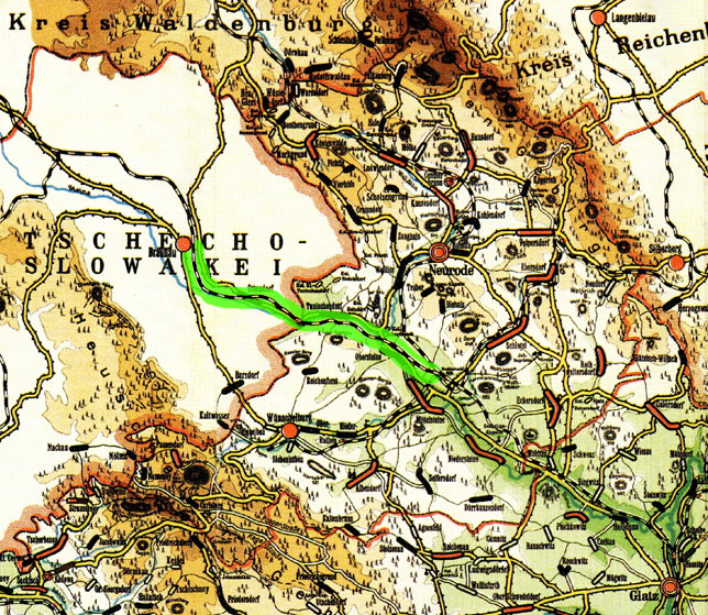 Przebieg linii Otovice - Tłumaczów - Ścinawka na fragmencie mapy Hrabstwa Kłodzkiego z 1930 r.